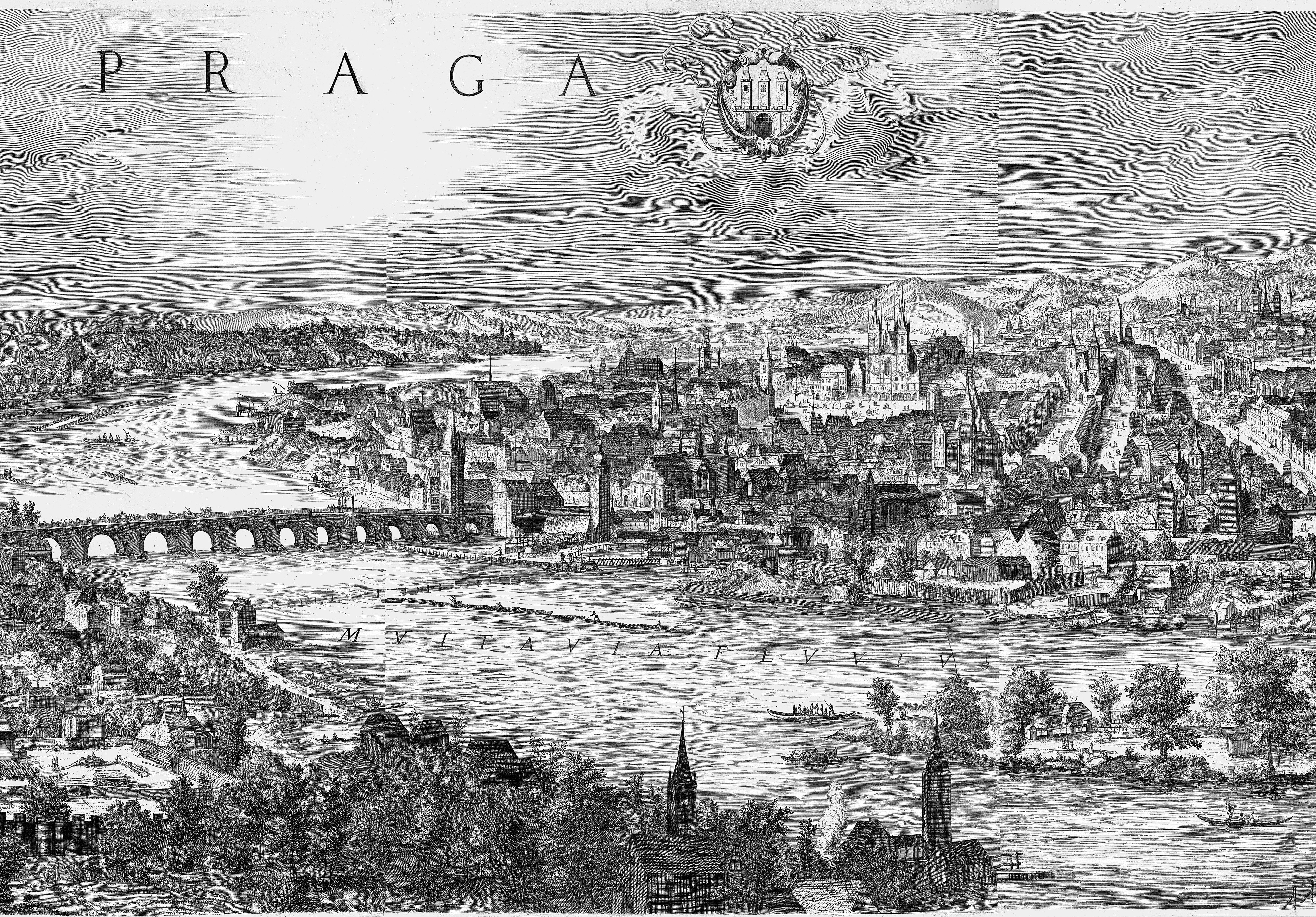 Výřez z tzv. Sadelerova prospektu, který zobrazuje Staré Město a část Malé Strany.